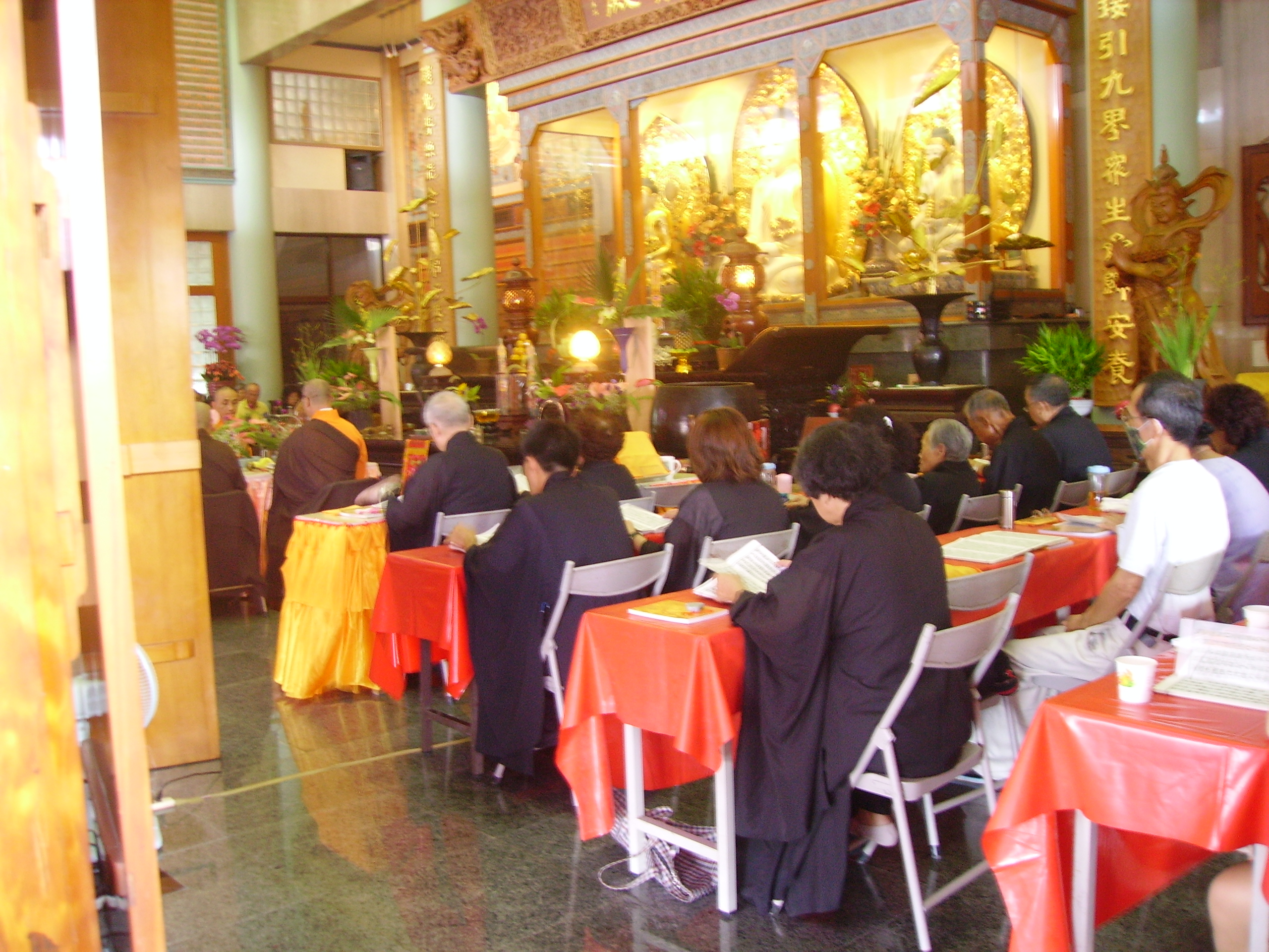 朗誦地藏經的台灣佛教信徒